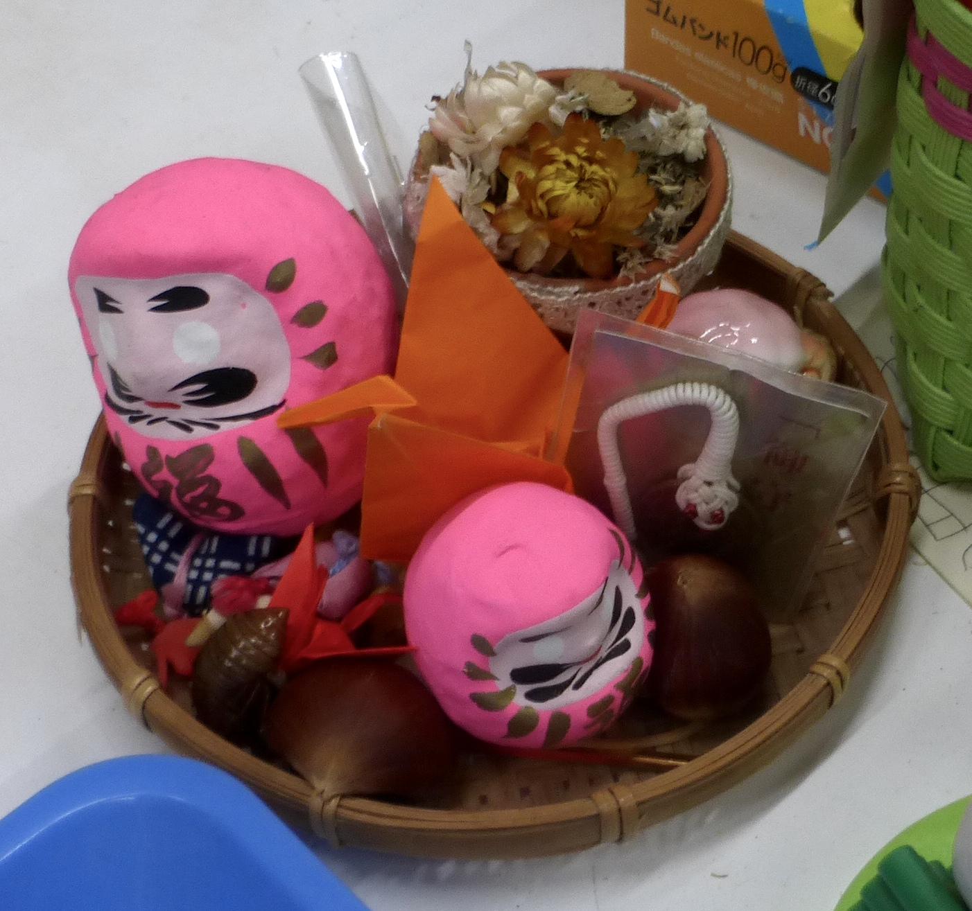 ネオンピンク色の達磨 (neon pink daruma doll)